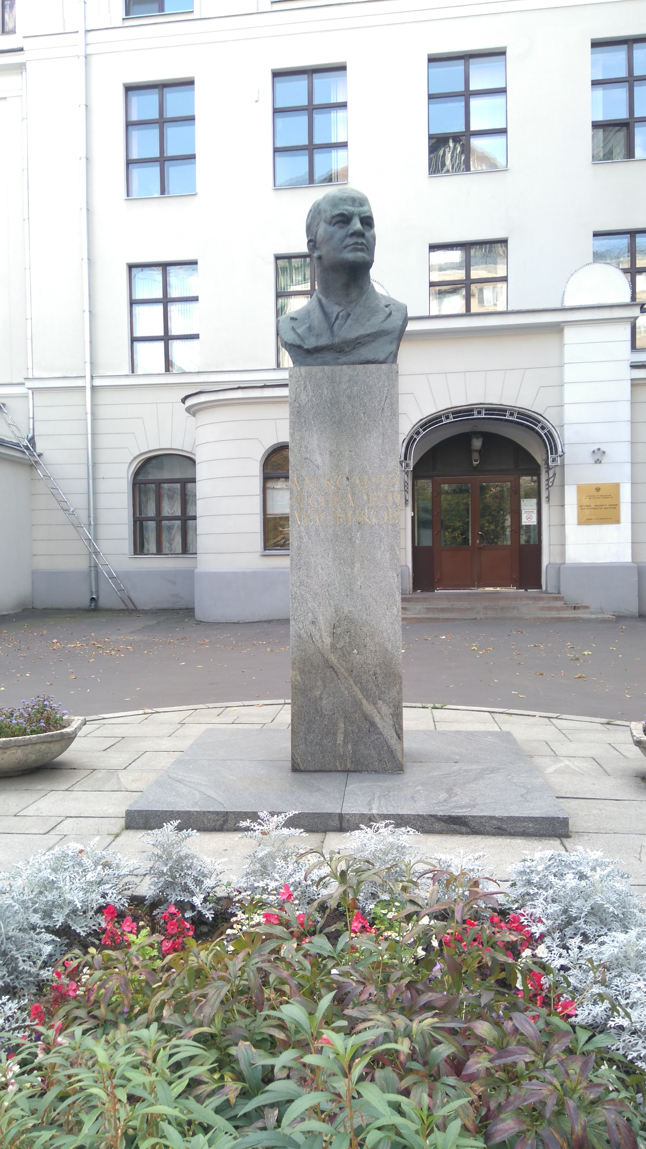 Памятник А.Л.Мясникову: Петроверигский пер., дом 10, Басманный, Центральный округ, Москва